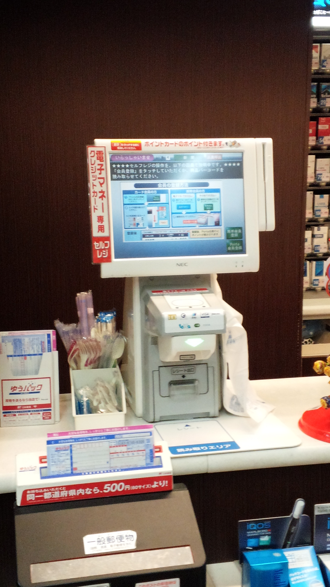 一部のローソン店舗に設置されているセルフレジ